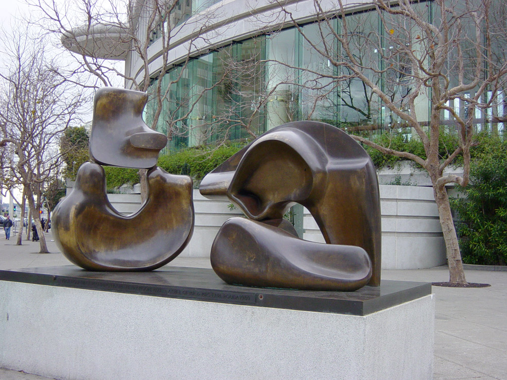 escultura de Henry Moore